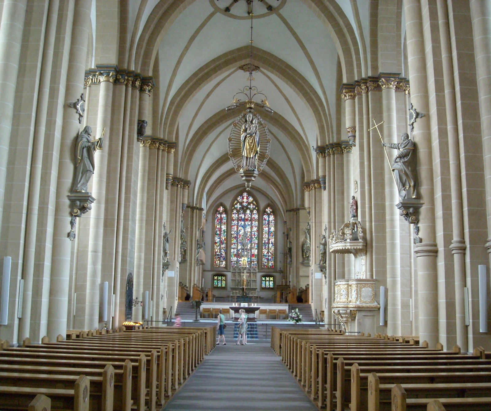 Innenansicht des Doms